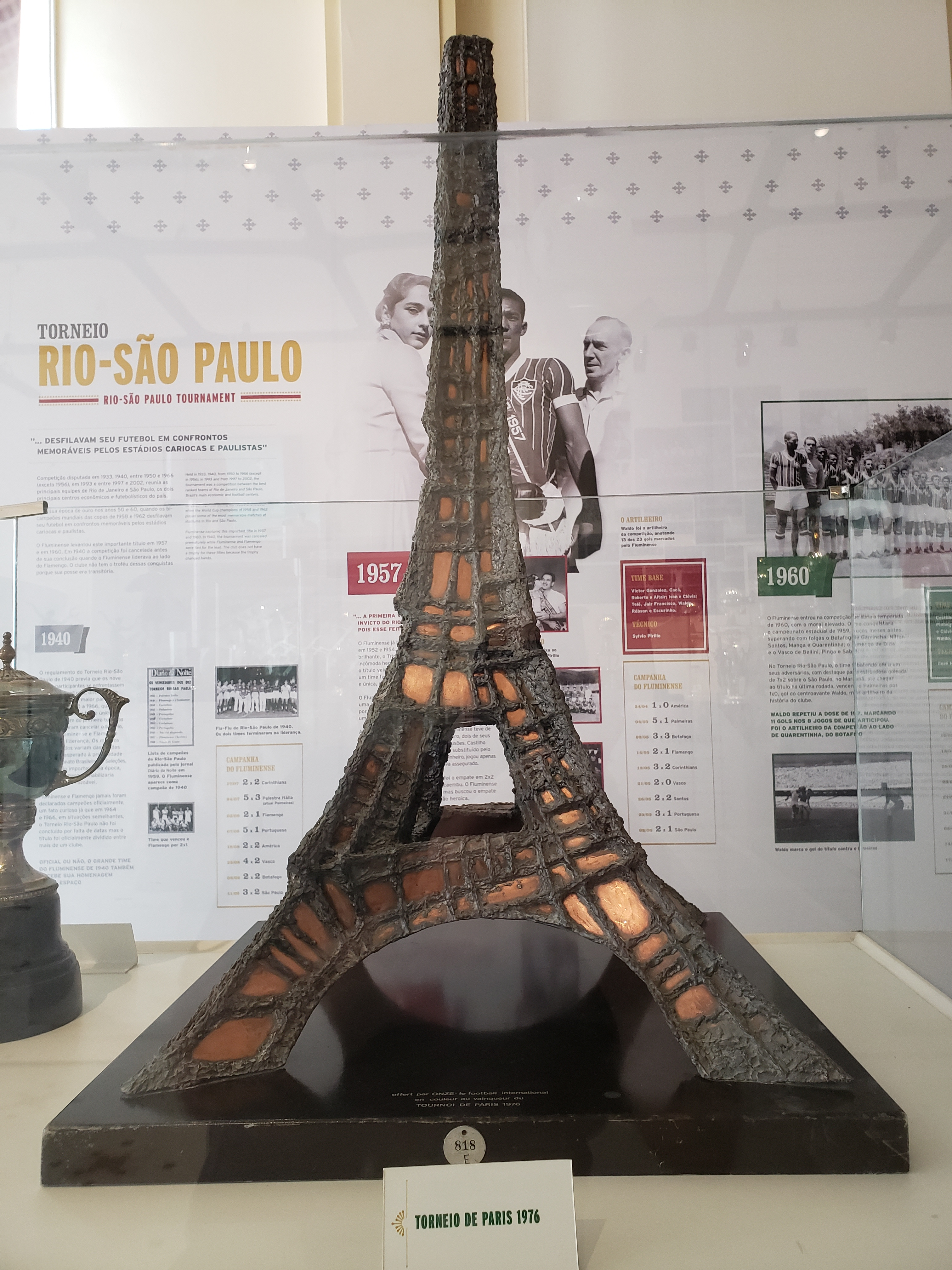 Torneio de Paris 1976 conquistado pelo Fluminense Football Club.